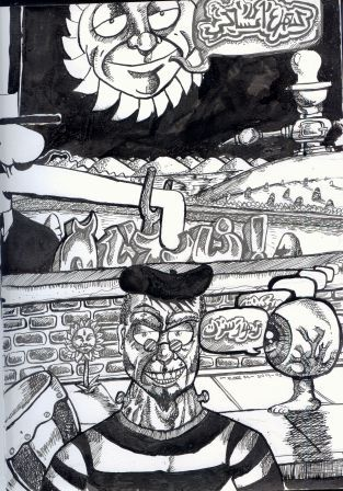 "Betnik". Pen and ink drawing, by Jah Maya